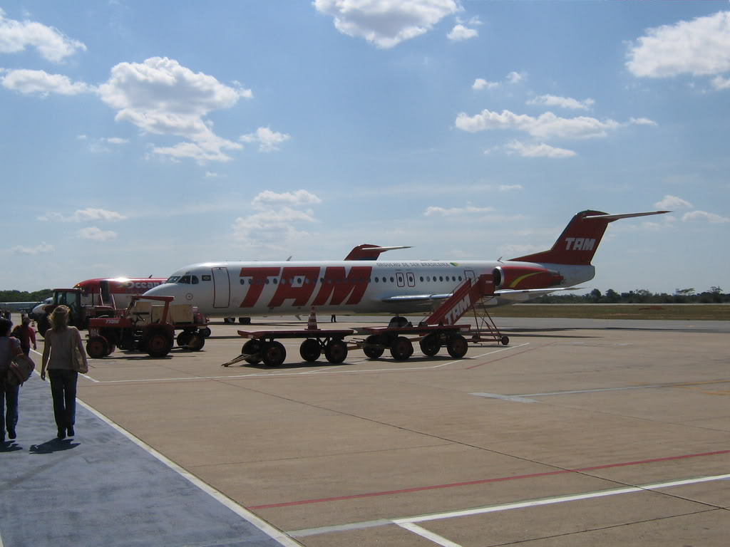 Vilhena